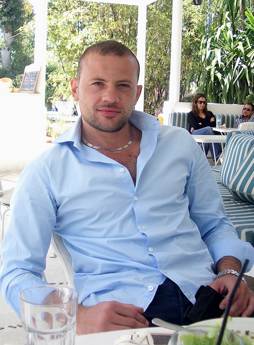 Photo de Monsieur Lionel Hugonnier, prise en 2009 a Casablanca